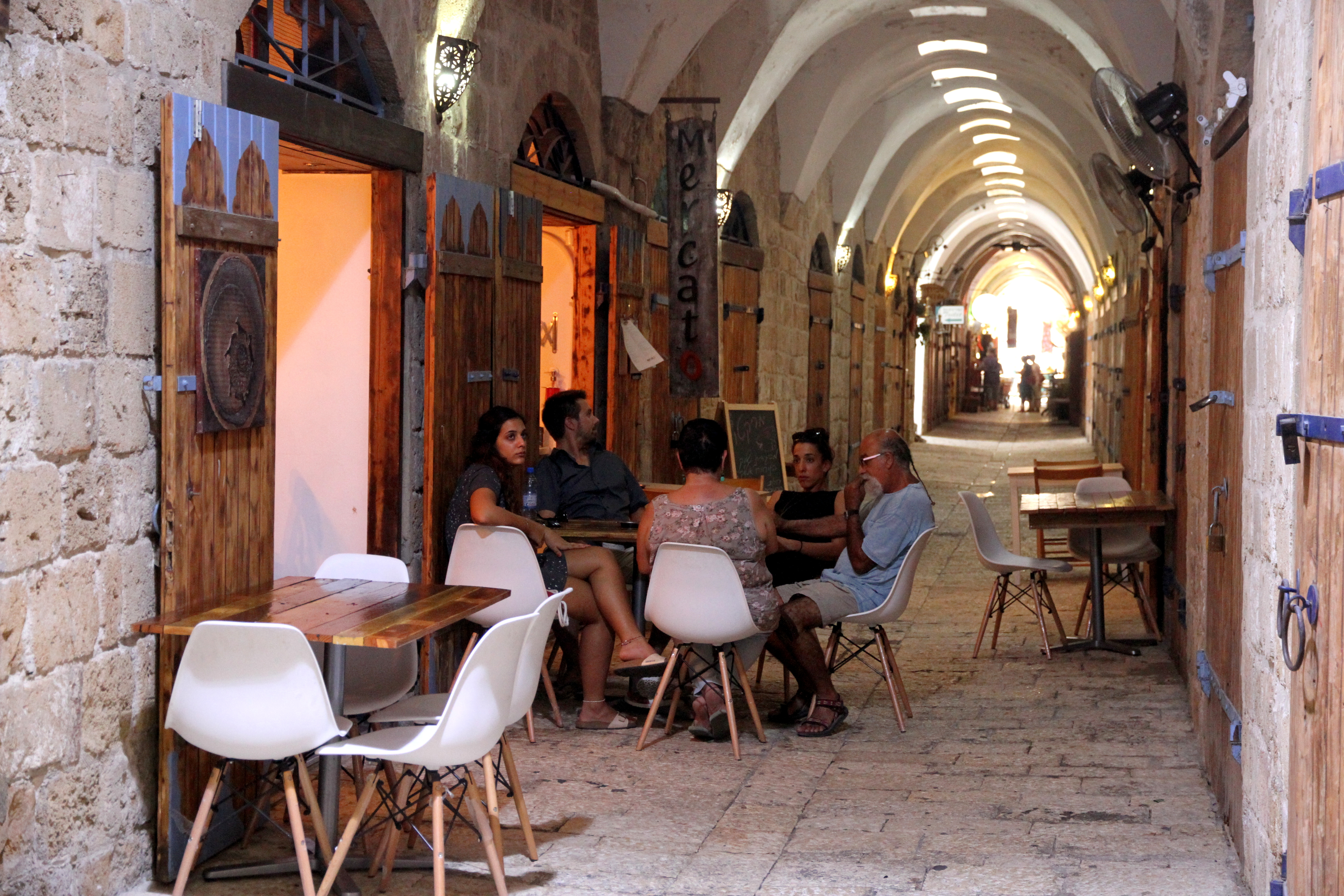 Acre